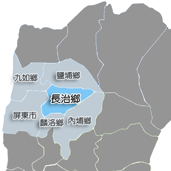 屏東縣長治鄉相對位置。